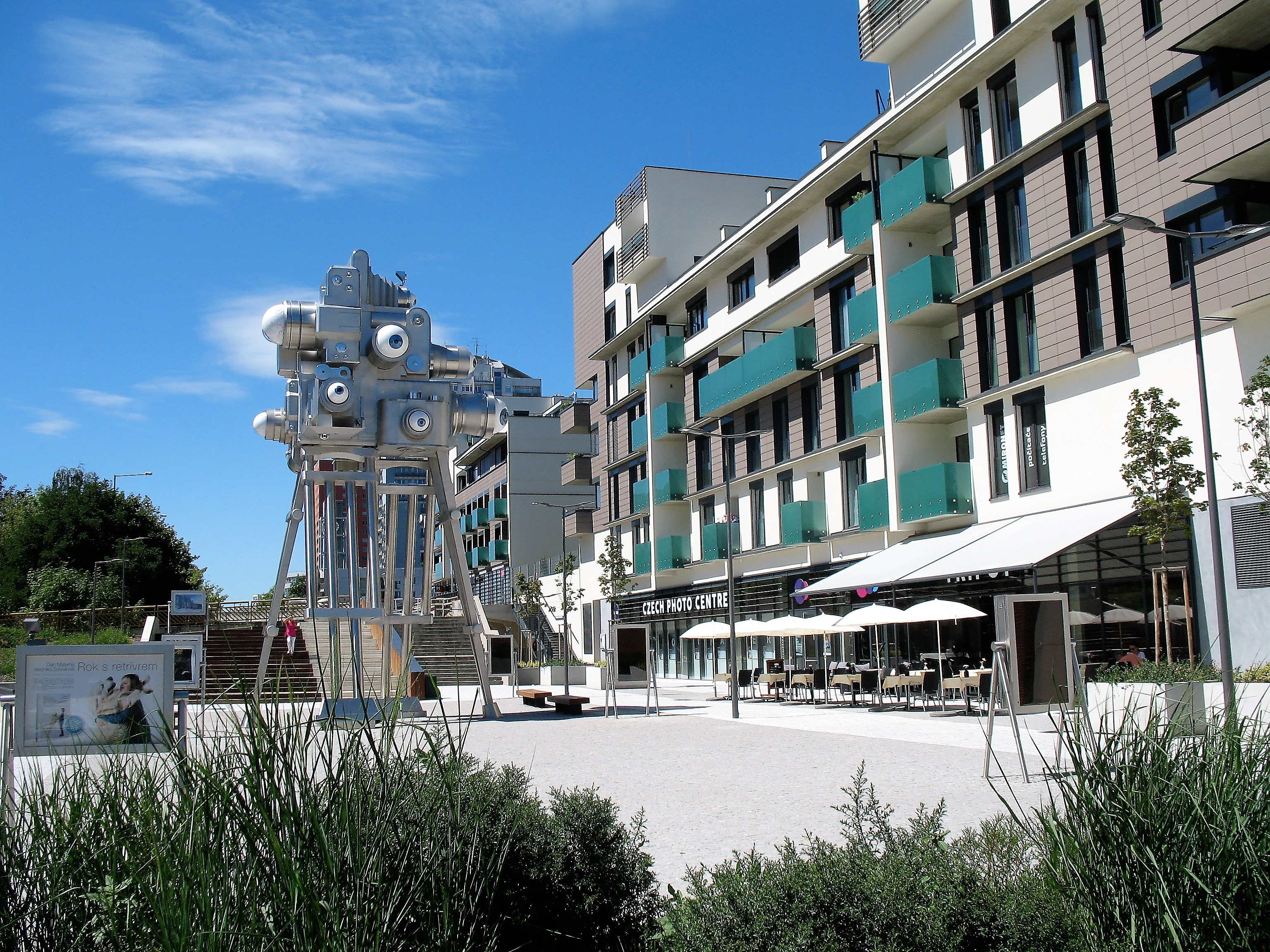 Czech Photo Centre, Seydlerova 2835/4, 158 00 Praha 5